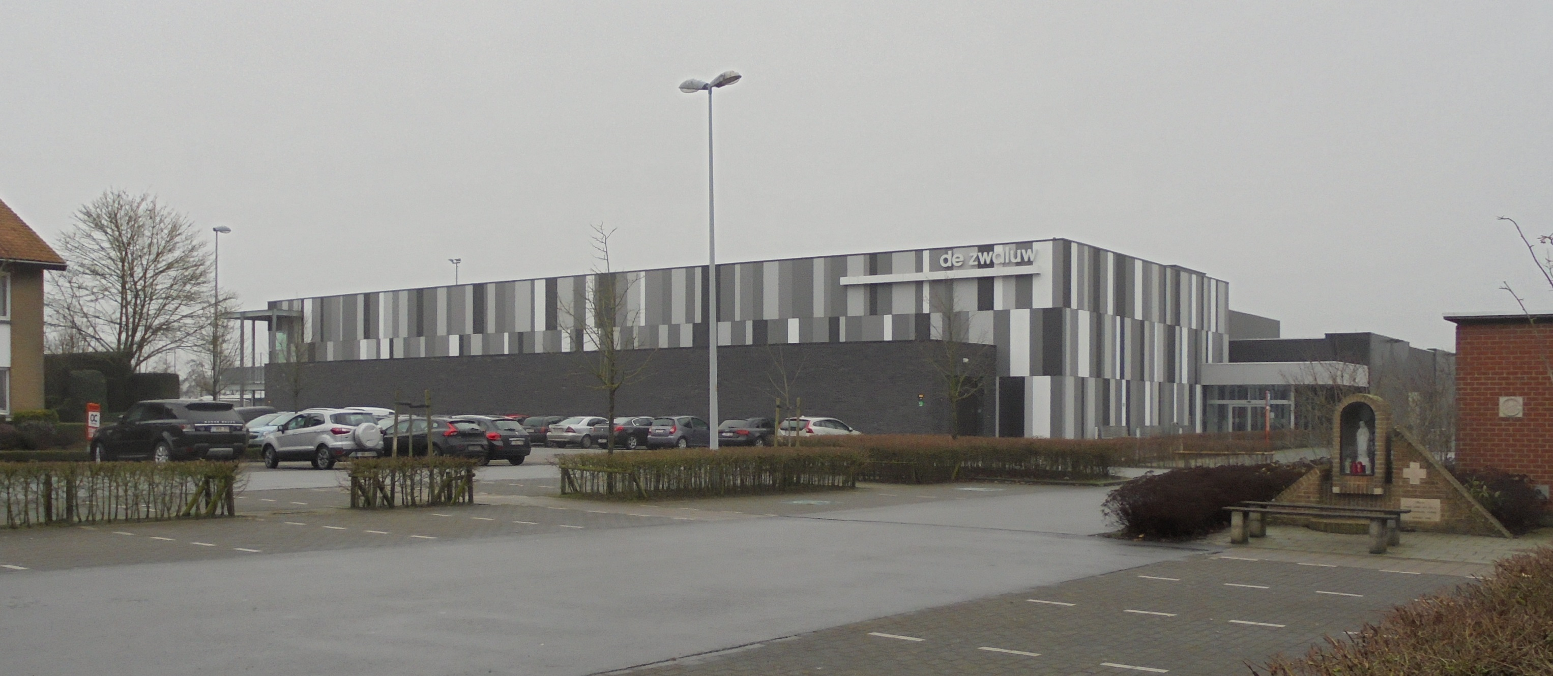 Sporthal De Zwaluw - Kasteelstraat - Zwevezele - Wingene - West-Vlaanderen - België